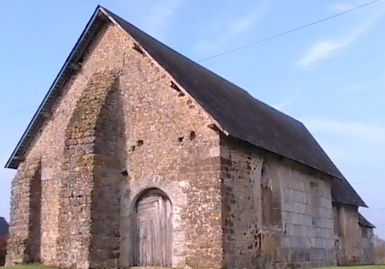 Église du Thilleul en Ouche vue du chemin rural n°7